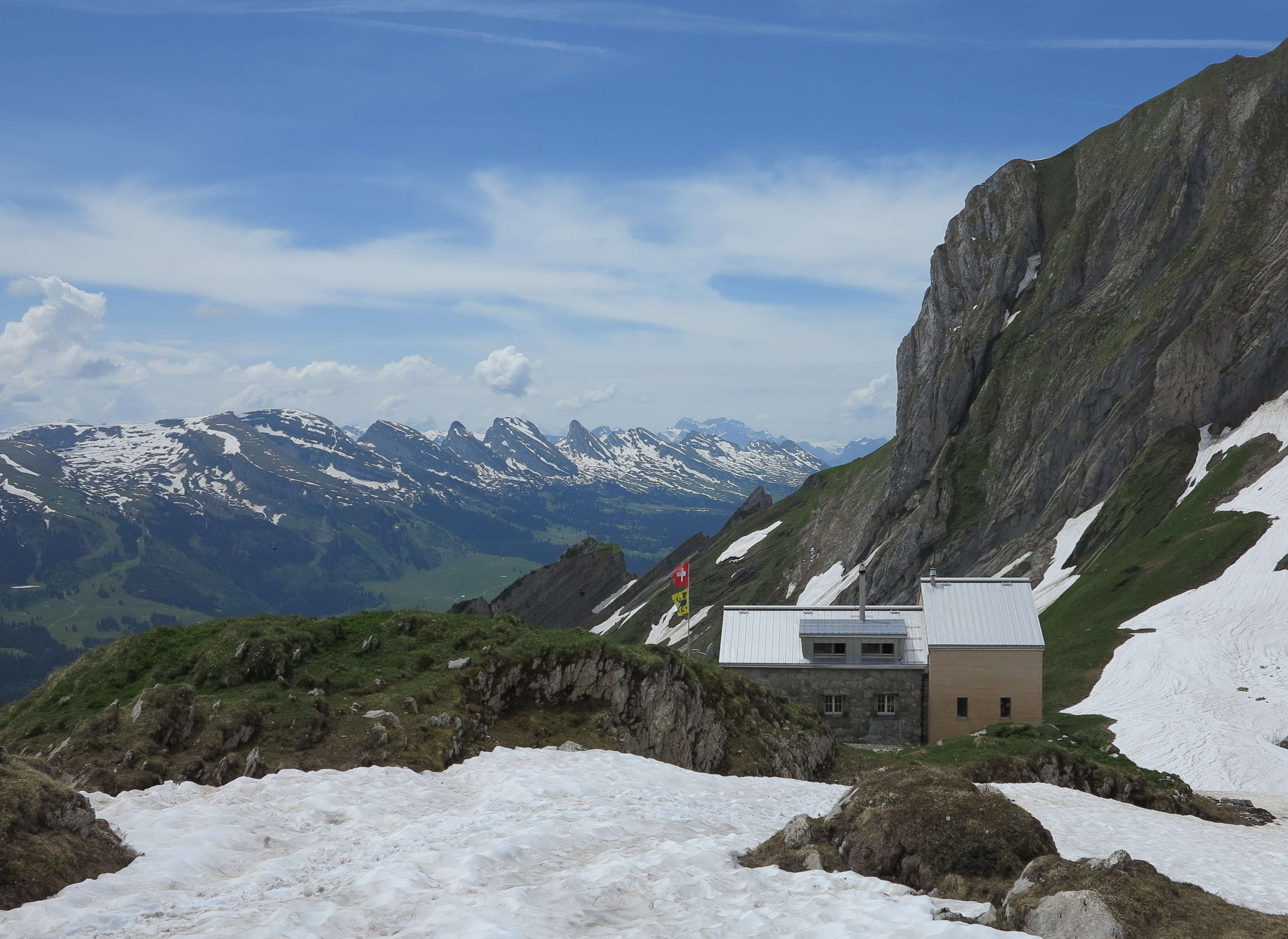 Zwinglipasshütte